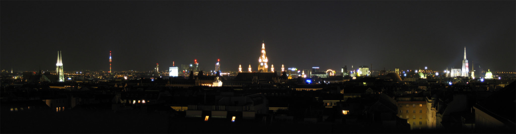 Vienna Panorama at Night.